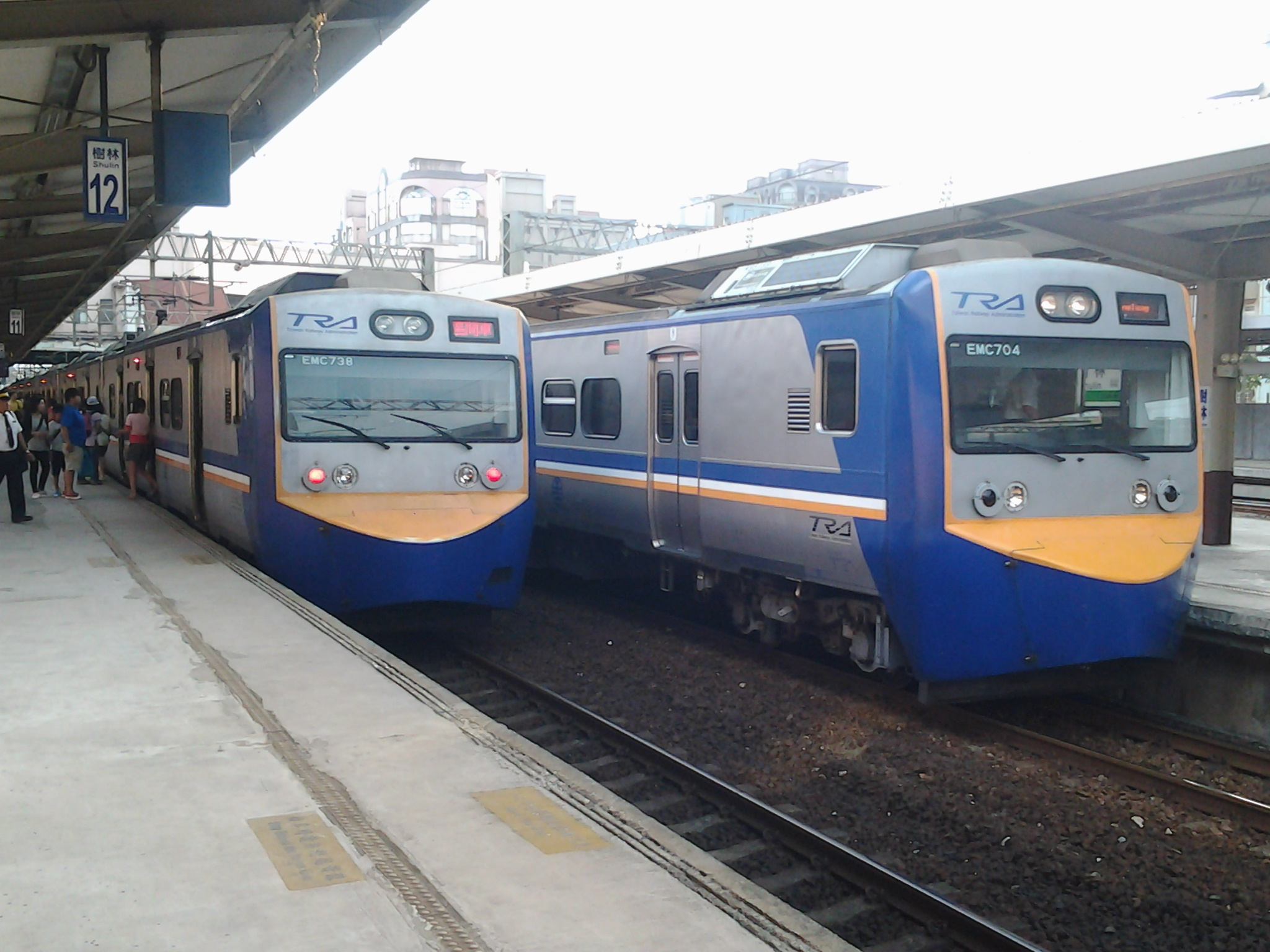 臺灣鐵路管理局EMU700型電聯車現在是北部區間主力的區間車車種，此為停靠樹林車站的EMC738與EMC704。